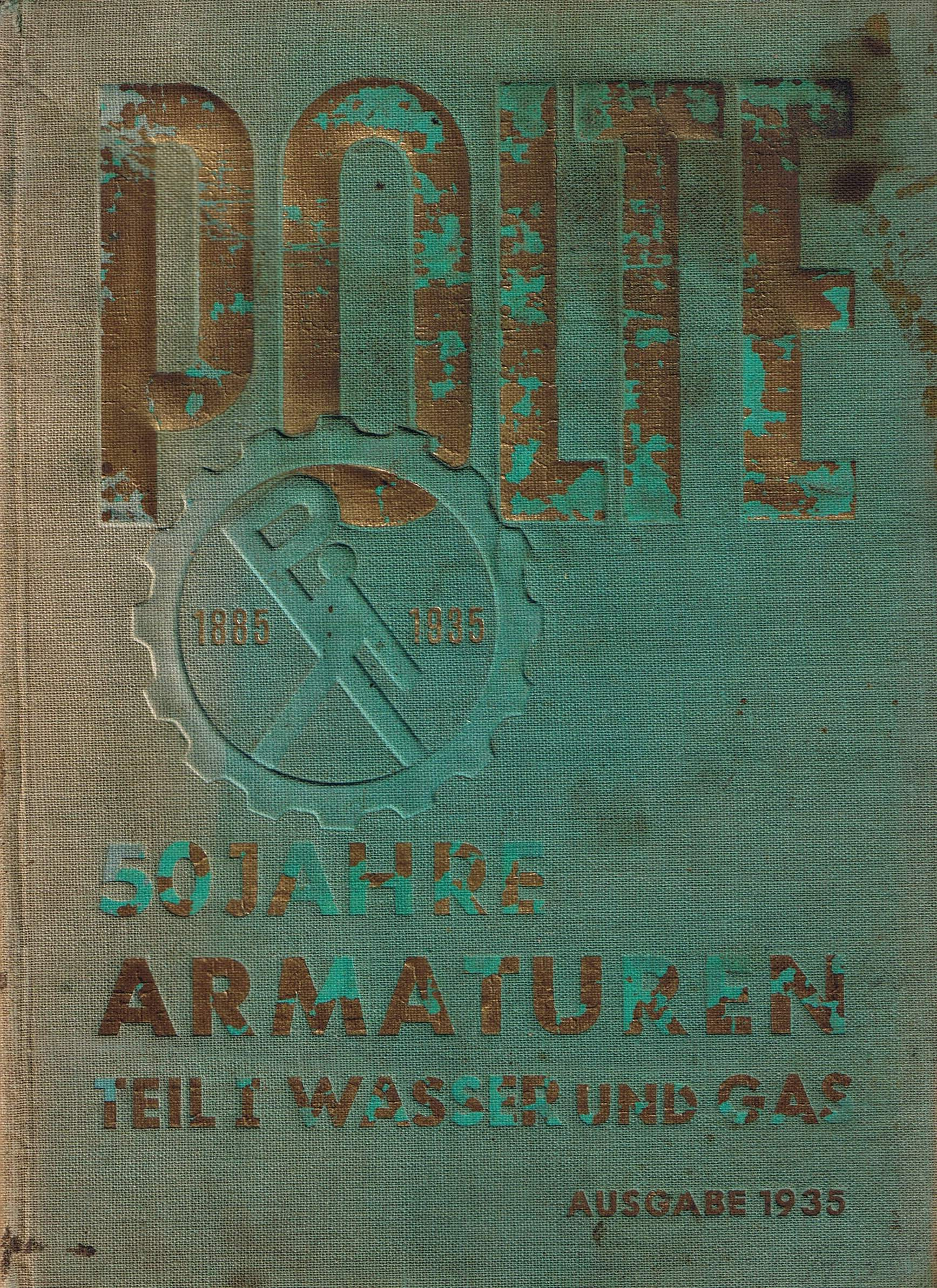 Polte-Werke, Jubilee-book 50 years